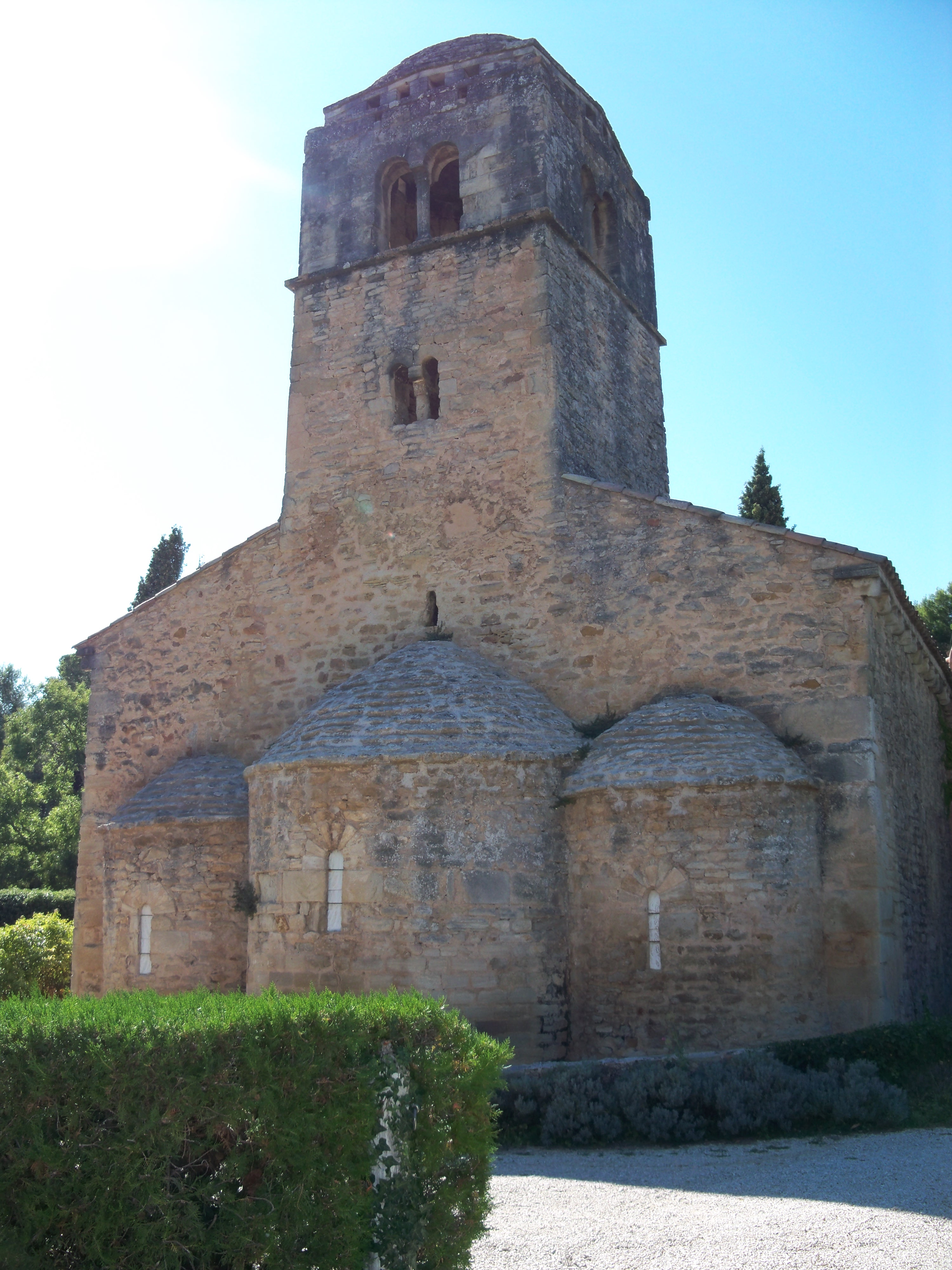 Chapelle de la Madeleine à Bédoin (84)